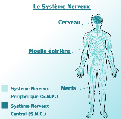 Ceci est le schéma de nos nerfs, qui parcours notre corps.Ænglisc: This is a pictures, show all the nerves of the Human body.